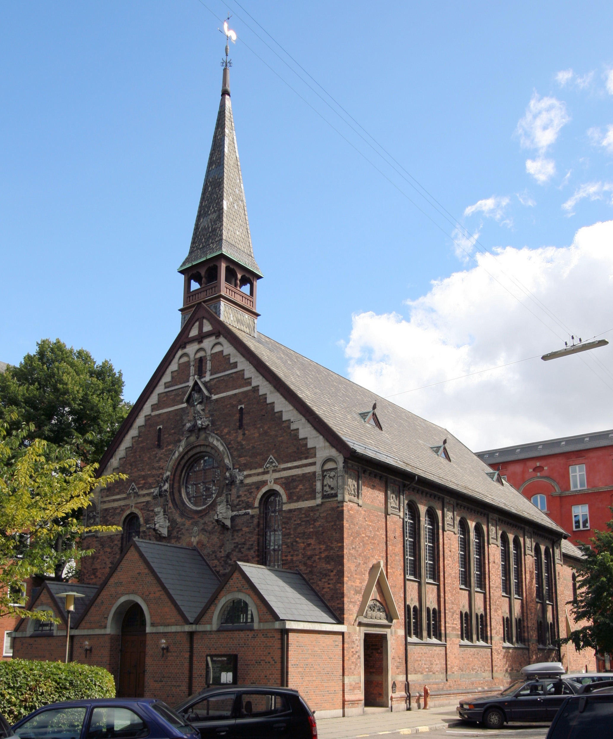 Sankt Lukas Kirke in Copenhagen, Denmark.